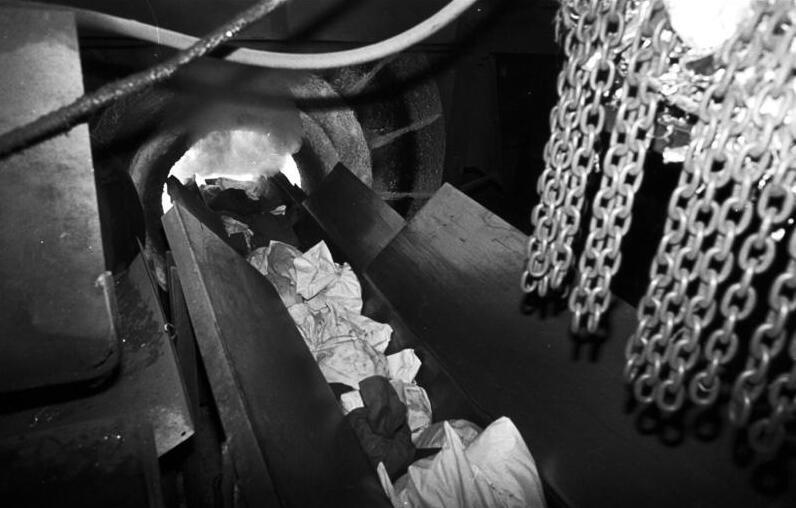 Leichtmetallwerk Rackwitz, DDR-Münzen zum Einschmelzen ADN-Gahlbeck/22.5.90 Bez. Leipzig: Im Leichtmetallwerk Rackwitz, hier befindet sich die einzige Aufbereitungsanlage der DDR, werden von den Filialen der Staatsbank der DDR angelieferte Geldsäcke mit Münzen eingeschmolzen. Über ein Rüttelband gelangen sie in den Schmelzofen.